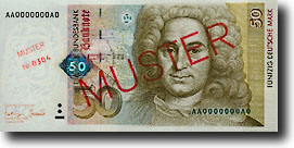 50 mark